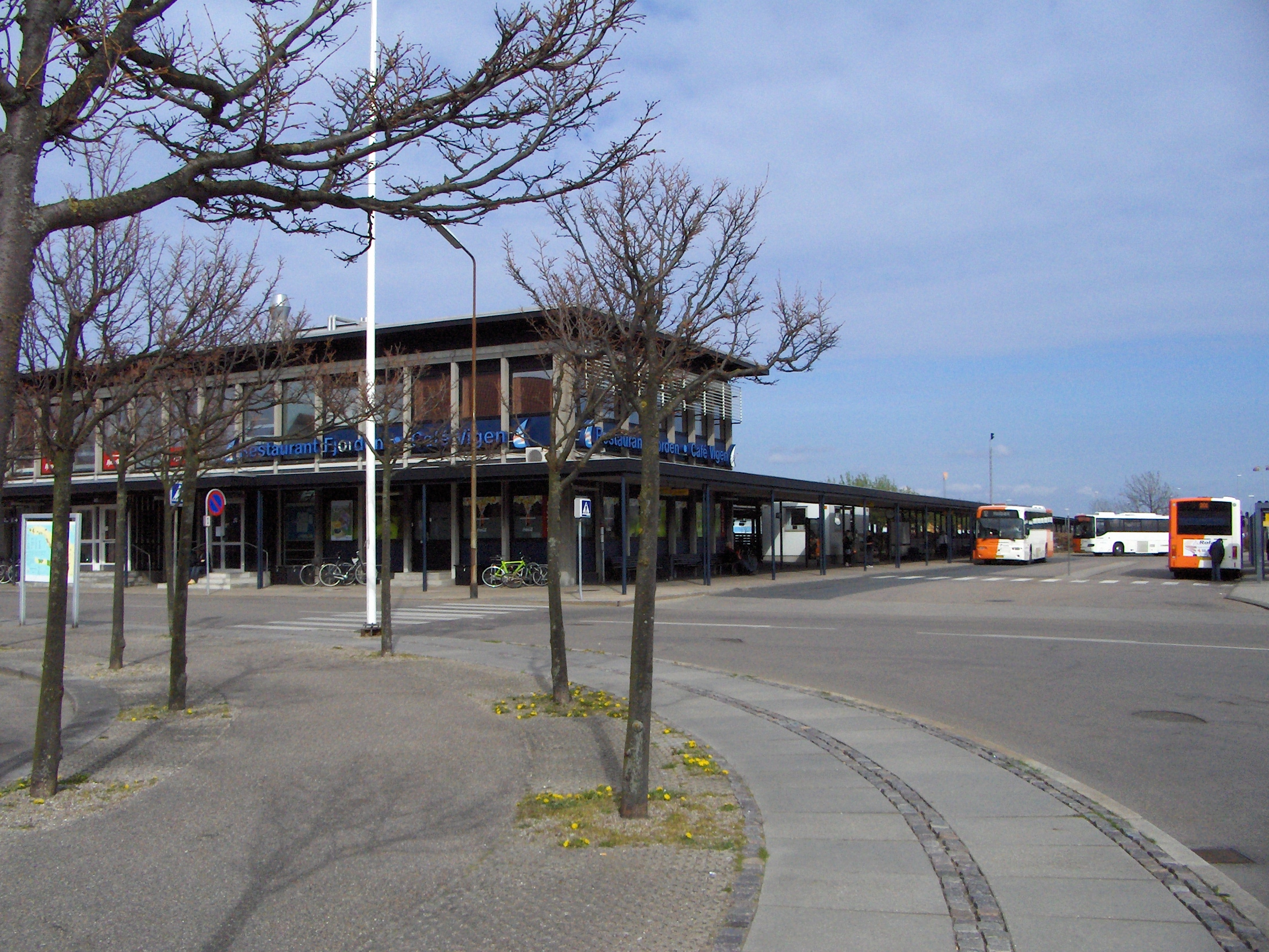 Kalundborg Station